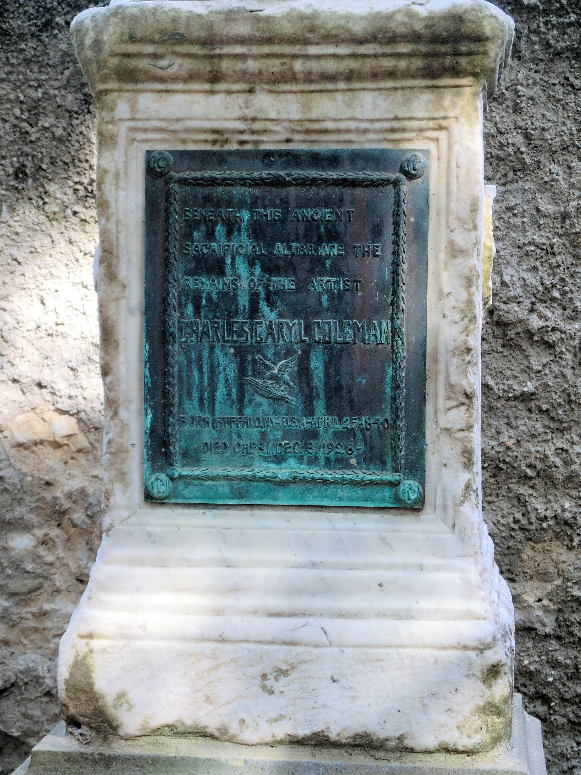 Cemeterio Acattolico Capri, Grave Caryl Coleman (1840-1928)